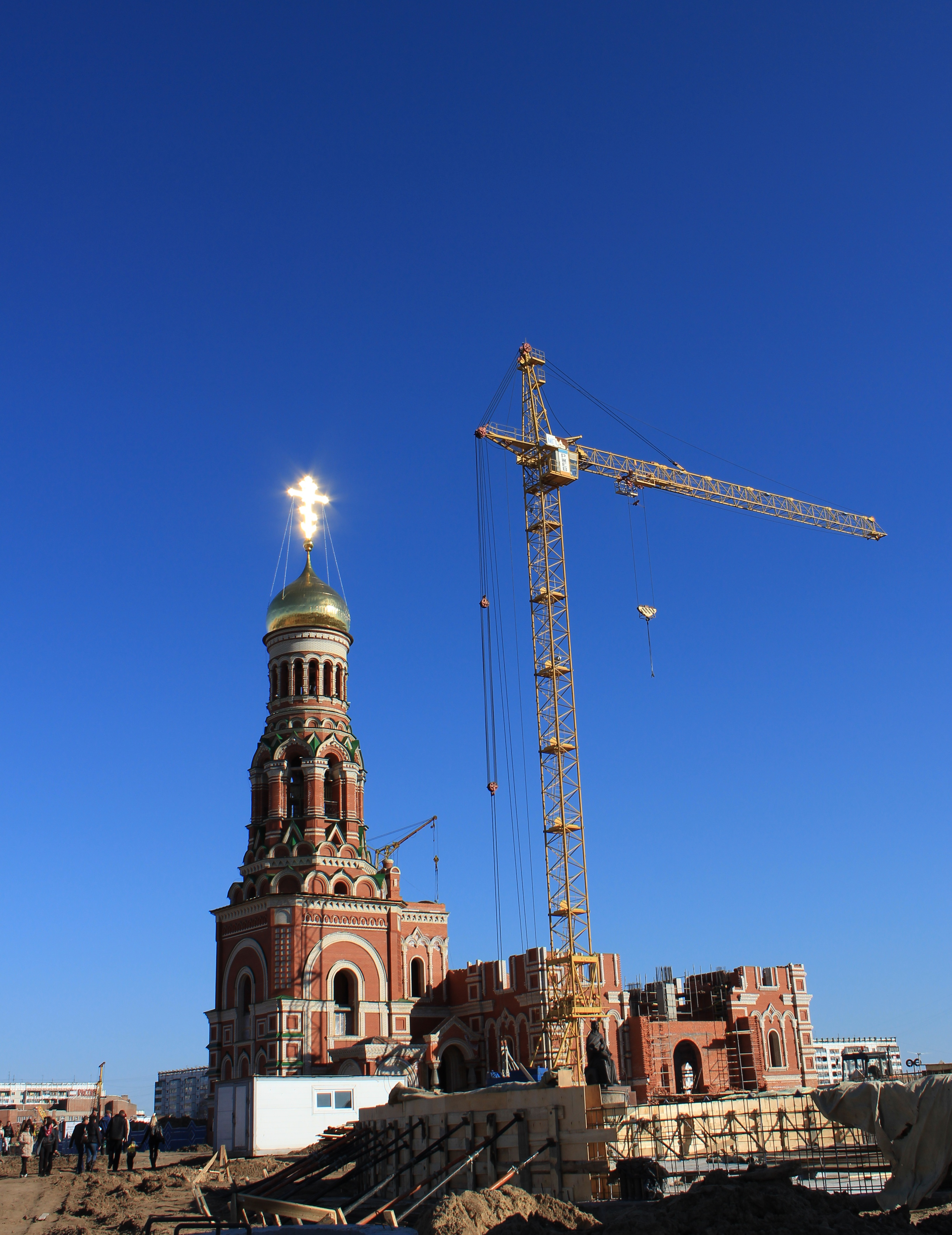 Yoshkar-Ola, Mari El Republic, Russia